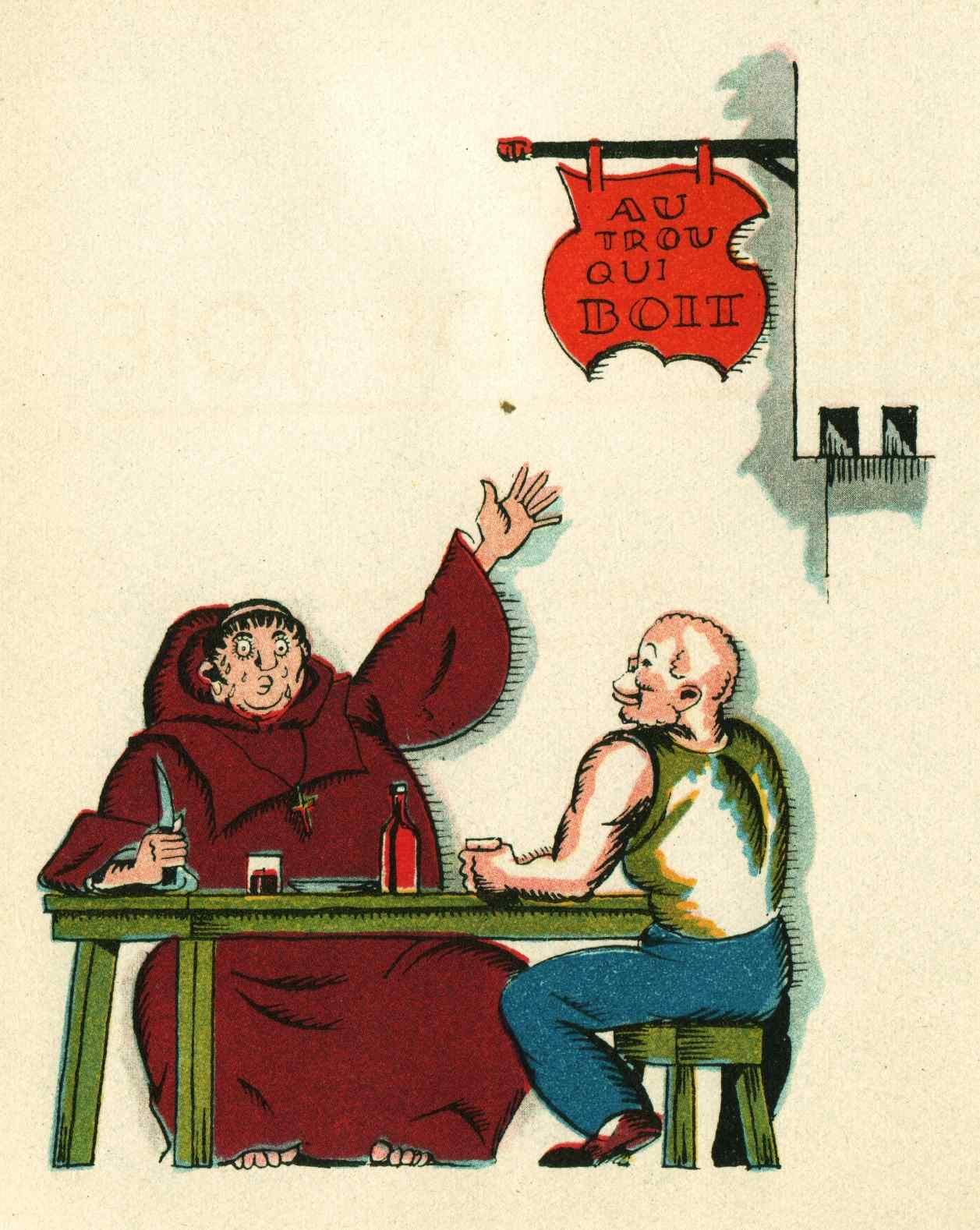 Frontispice du Livre Le Brelan de Joie (sur l'édition Athena de 1945, édition originale Grasset 1924) illustration au pochoir